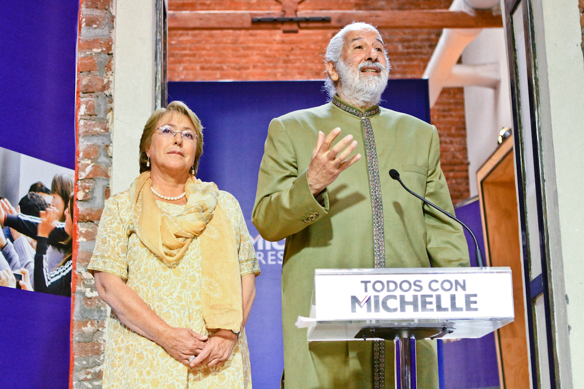 Alfredo Sfeir anunció su apoyo a Michelle 05/12/2013